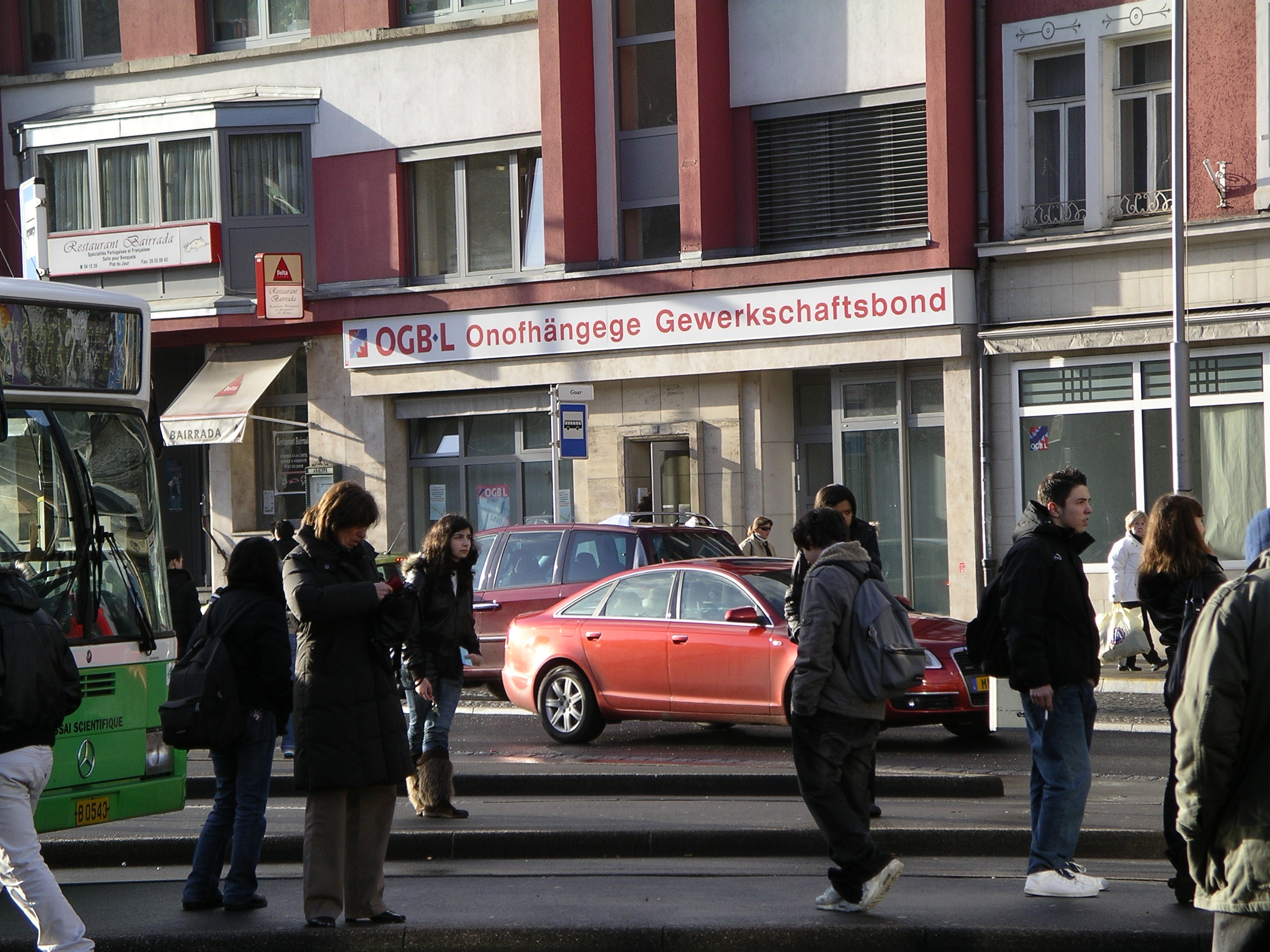 "Maison du Peuple", Haus der Gewerkschaft OGBL in Esch-sur-Alzette